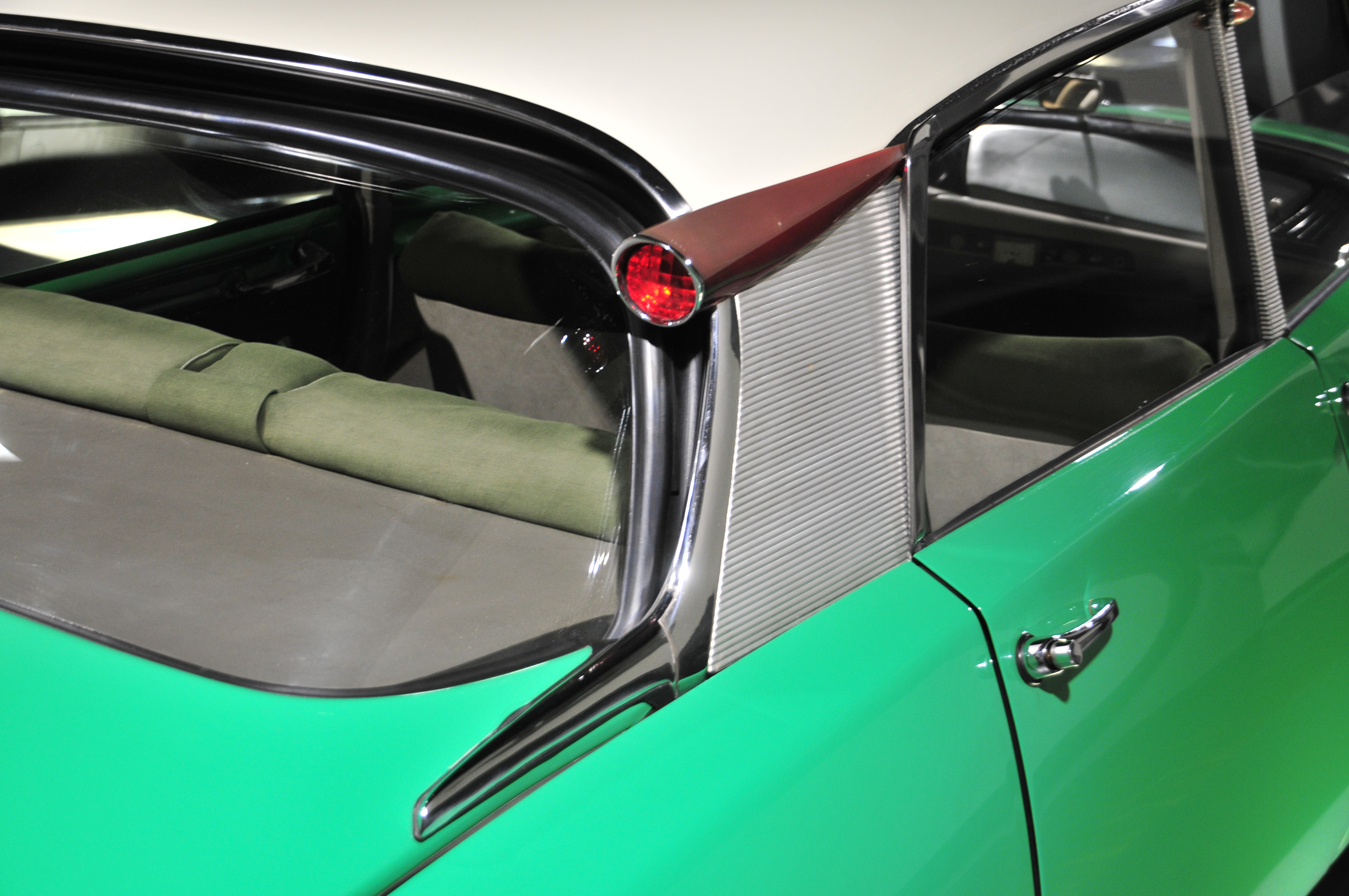 Fahrzeug in der Autostadt Wolfsburg